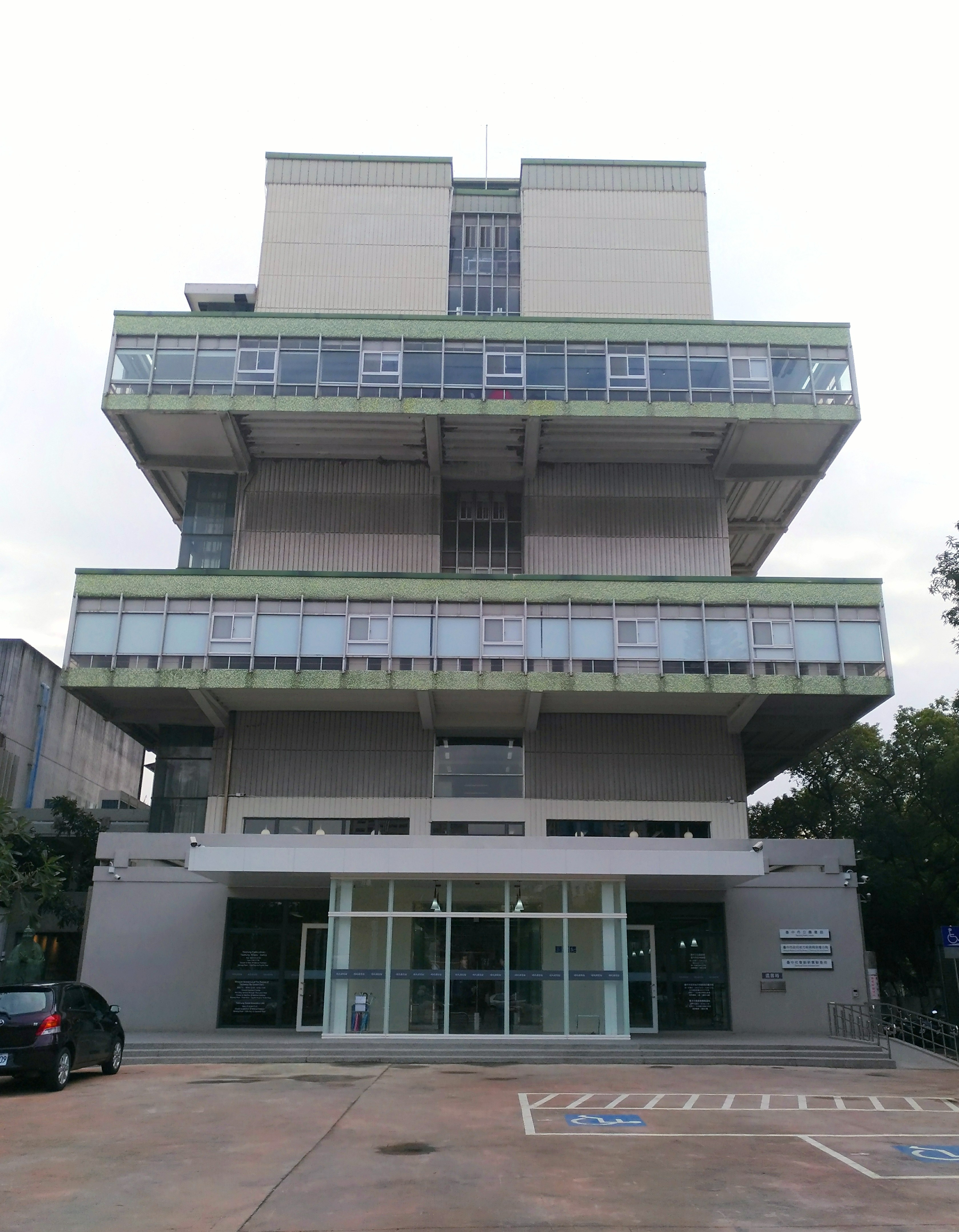 臺中市立圖書館精武圖書館外貌